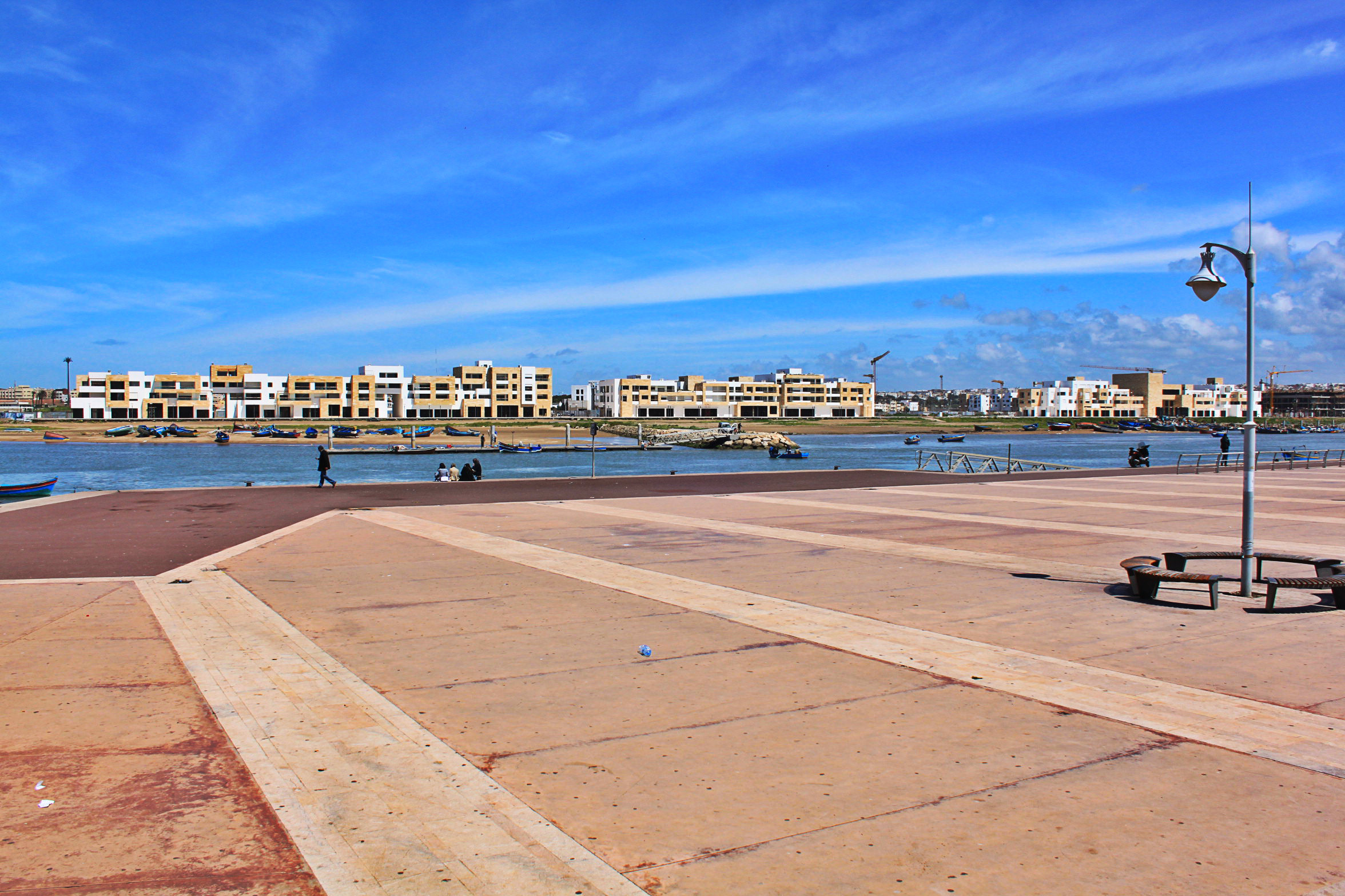 Bab-el-Bahr